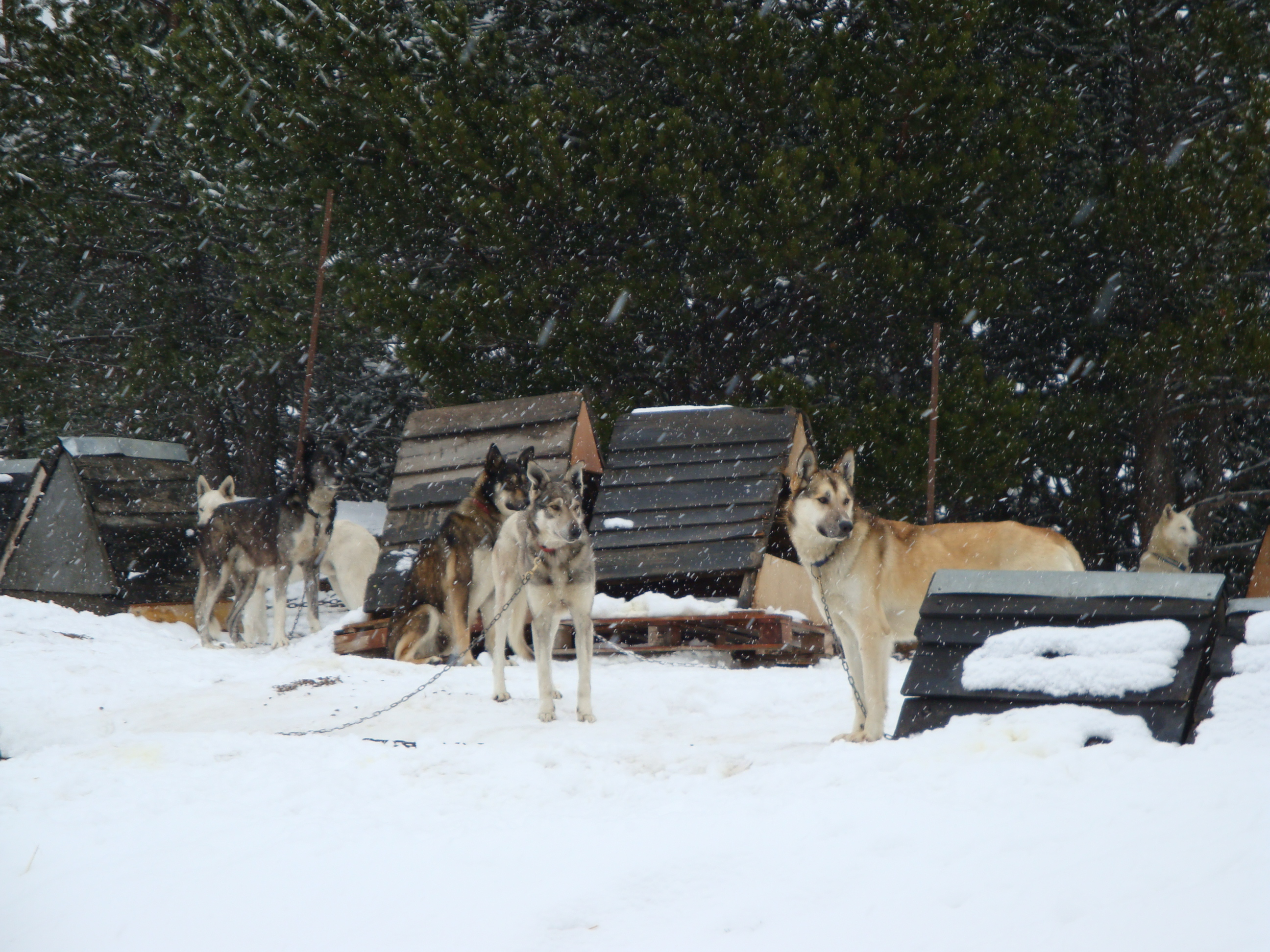 Perros de trineo en Andorra